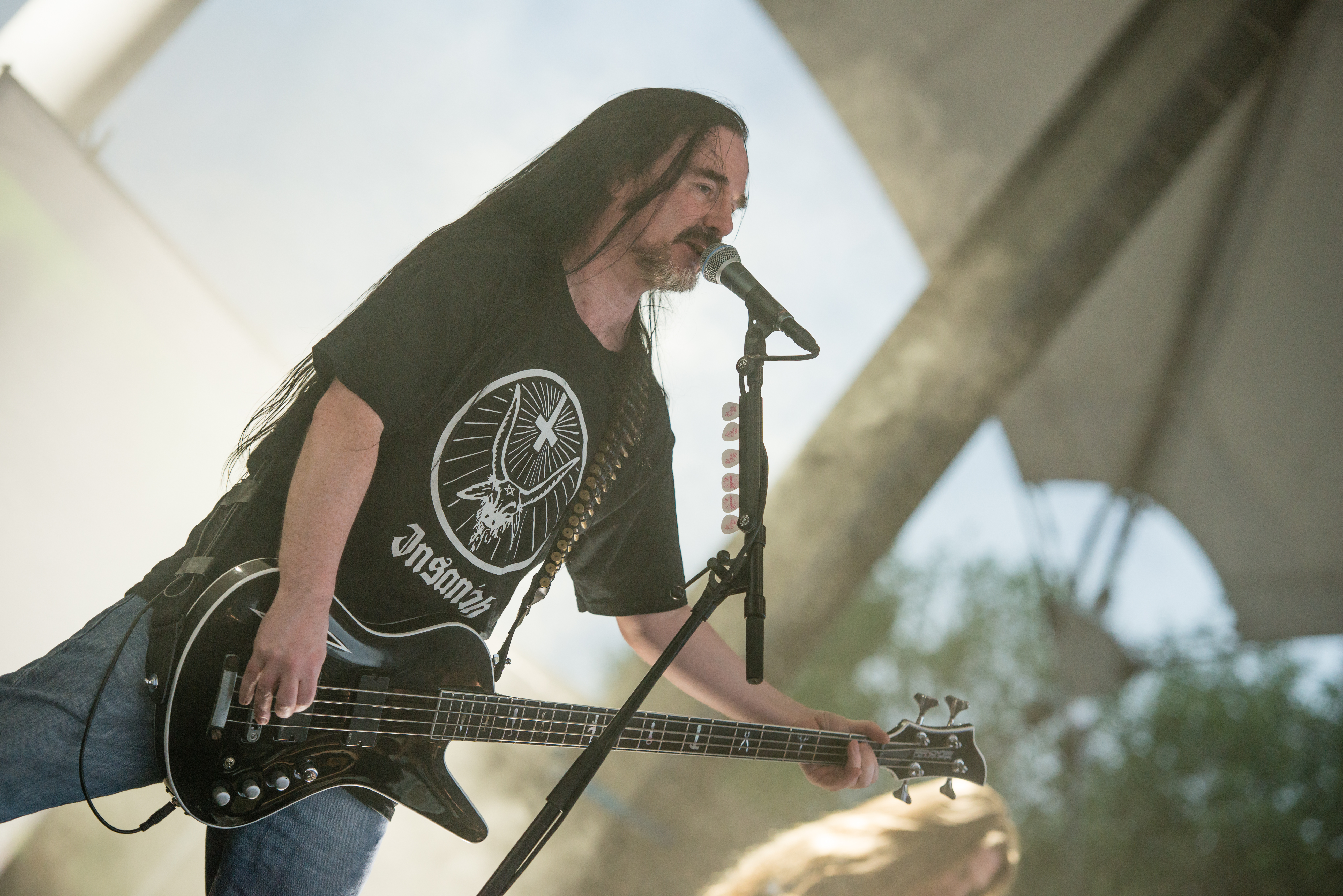 'Rock Hard Festival 2014 - Gelsenkirchen': 'Carcass'